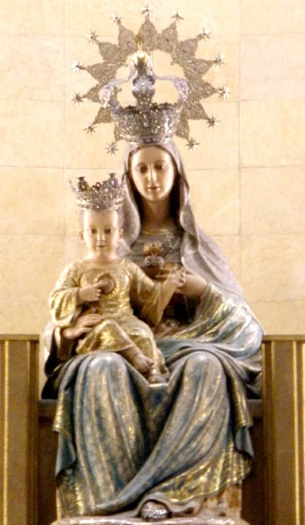 Iglesia del Inmaculado Corazón de María, en Oviedo